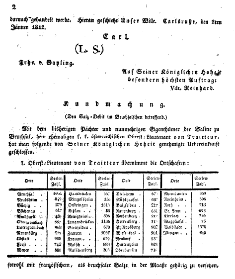 Aufstellung über die Verteilung der Salzabnehmer in den umliegenden Orten von Bruchsal; Note: Mingolsheim ist mit 336 Seelen falsch aufgeführt richtiger sind 1336 Seelen/Einwohner. Dafür Östringen statt 1613 nur 613!